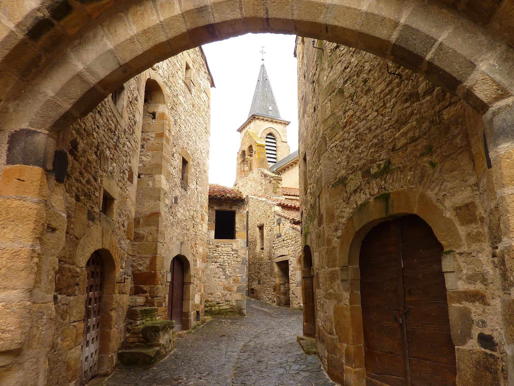 Fort de La Sauvetat (Puy-de-Dôme, France).